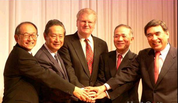 2005年03月攝於日本東京御殿山，記者會現場--RING 03:22 2005年12月2日 (UTC)